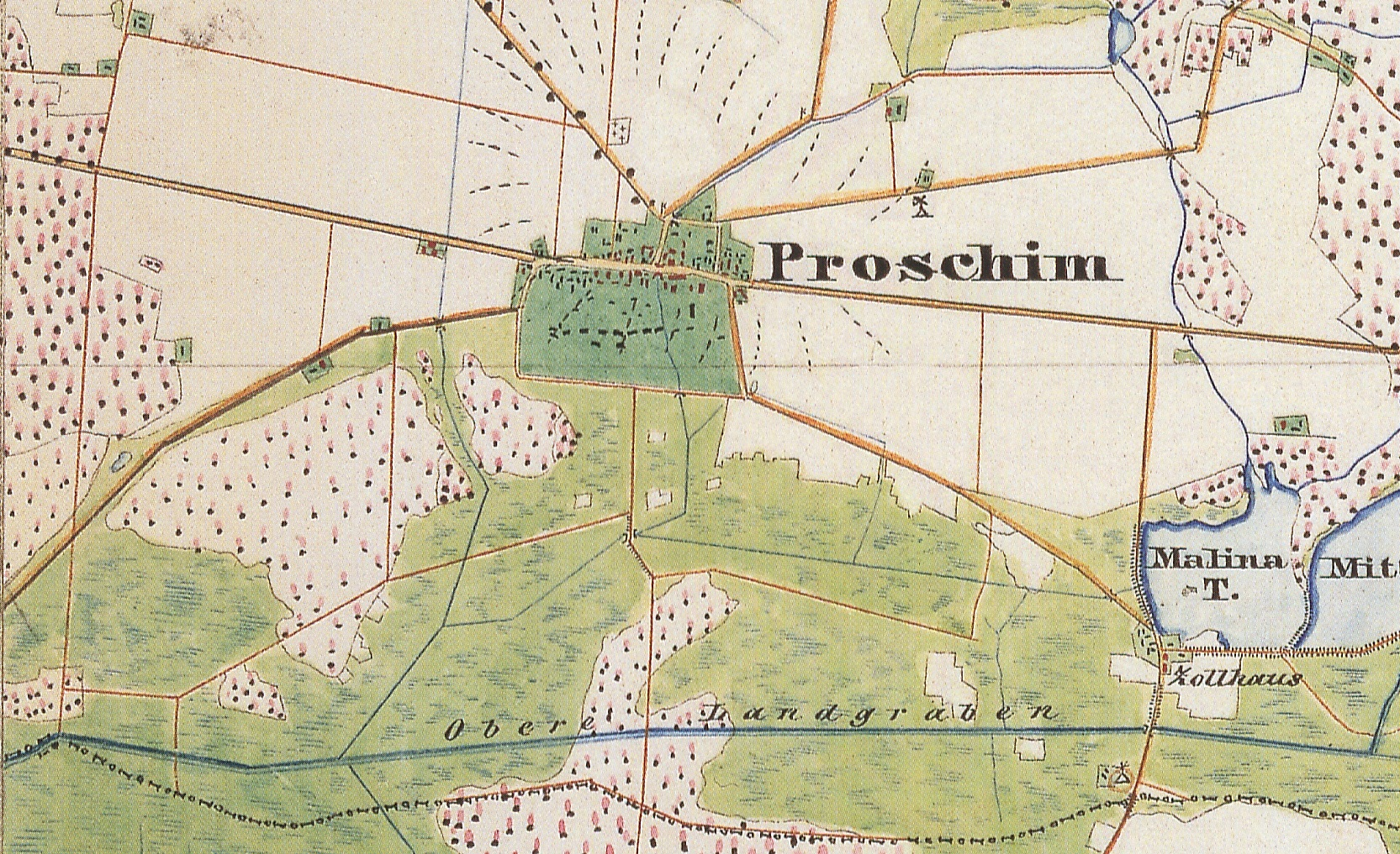 Proschim, Gemeinde Welzow, Lkr. Spree-Neiße, Brandenburg, Ausschnitt aus dem Urmesstischblatt 4451 Welzow von 1846